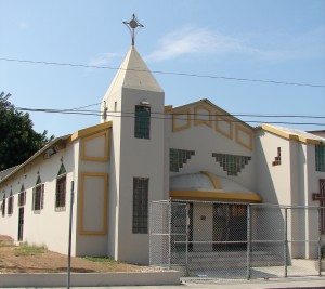 Catedral de Cristo Rey - Iglesia Episcopal del Ecuador - Diócesis Litoral Ubicada en Guayaquil Ecuador